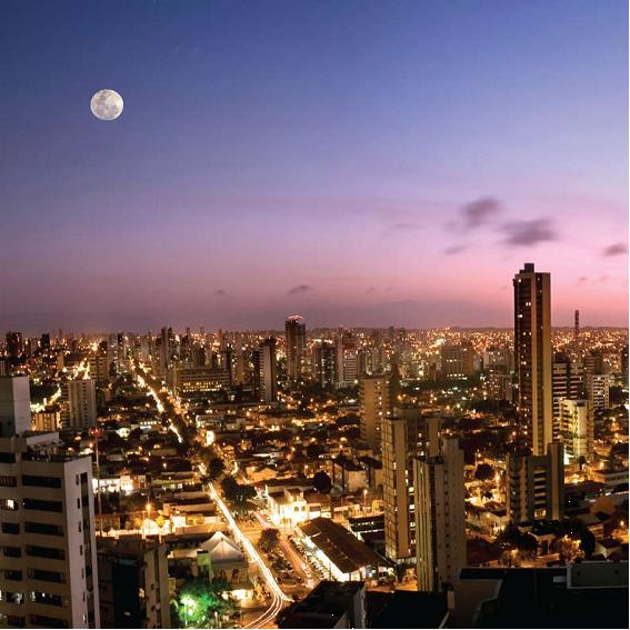 Imagem noturna de Natal - Rio Grande do Norte